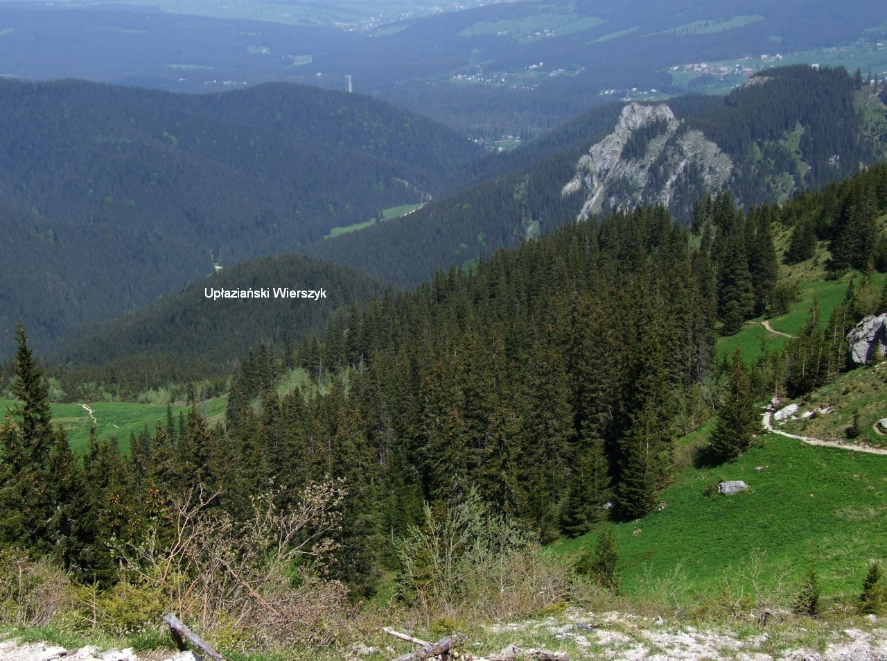 Widok z północnego grzbietu Ciemniaka na dolinę Kościeliską. W dole Upłaziański Wierszyk, po prawej stronie Kończysta Turnia